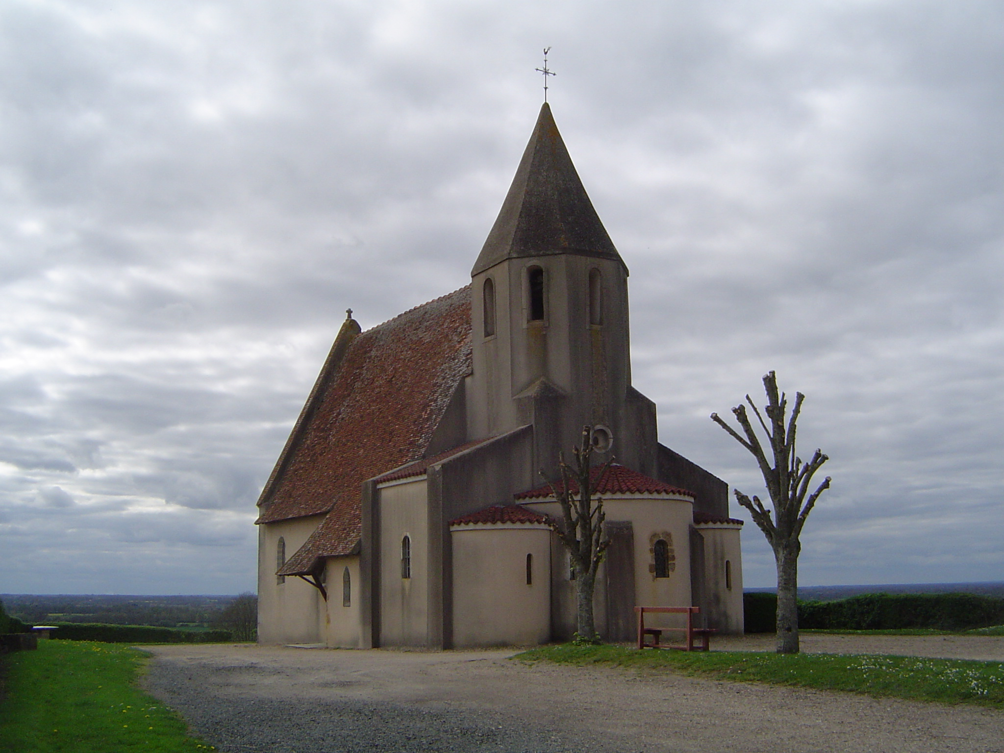 Vitry-sur-Loire (église 1)